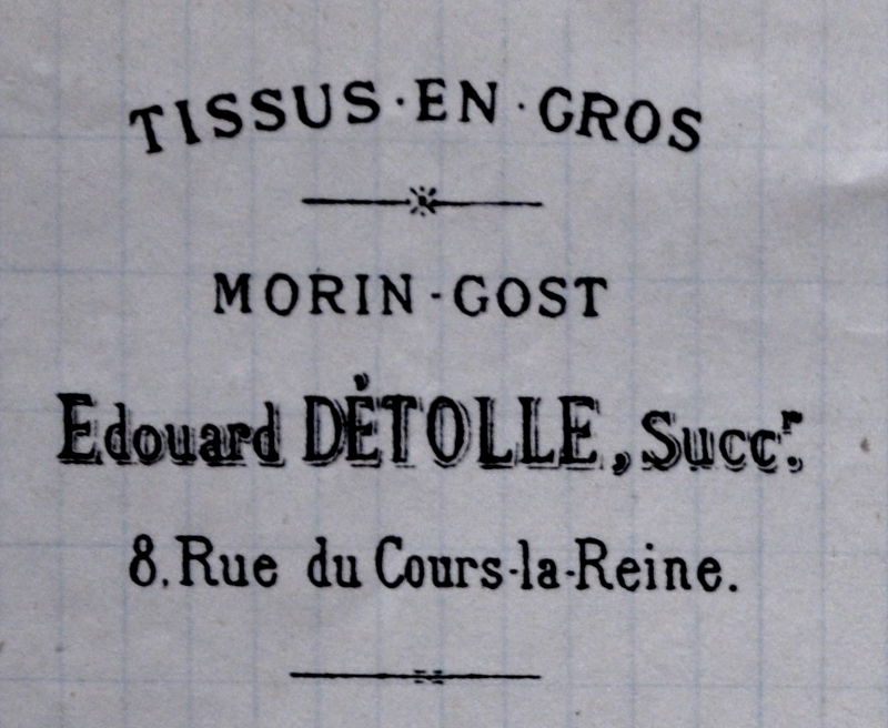 Entête des factures de la société de négoce DETOLLE